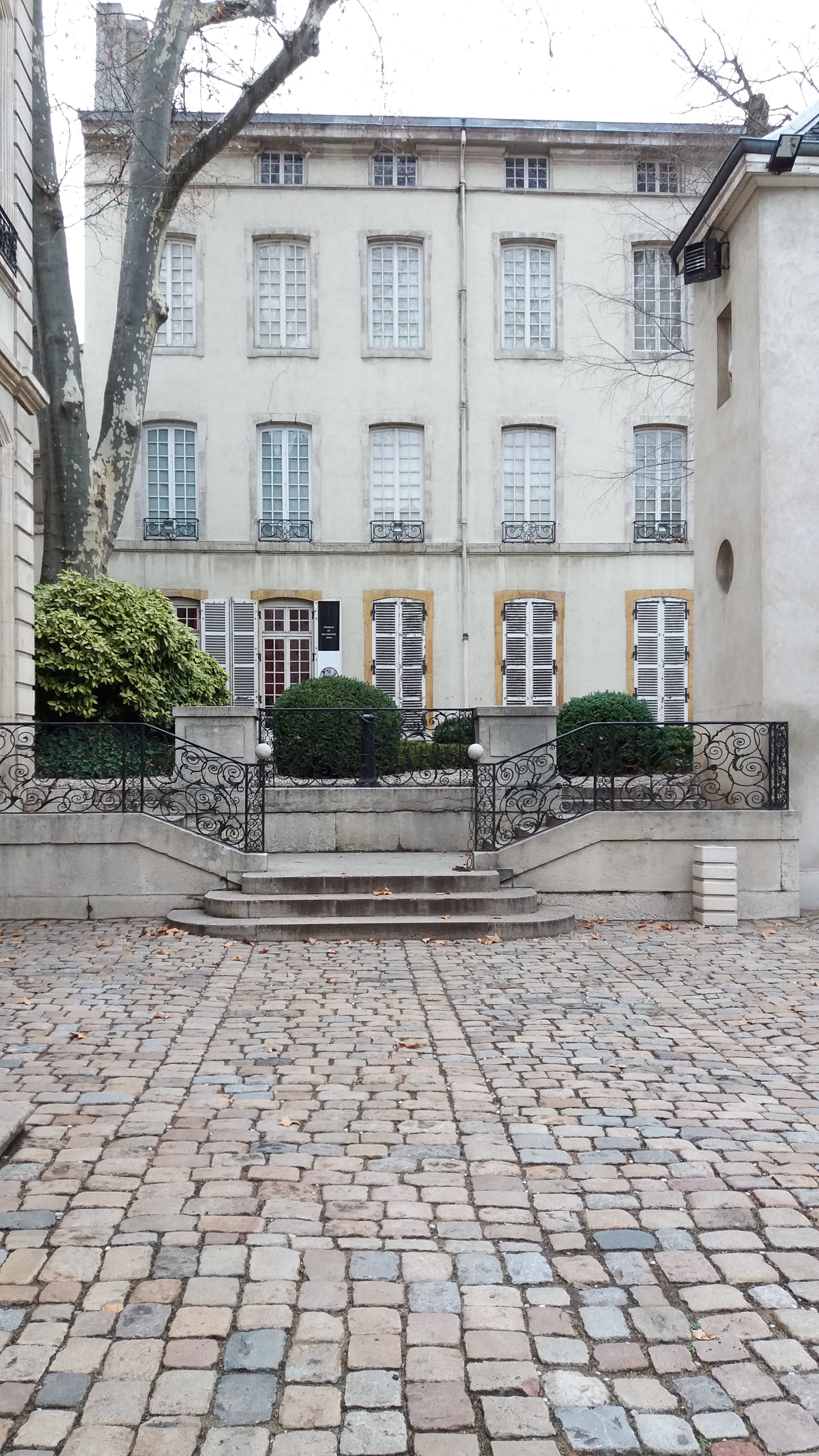 Escalier.